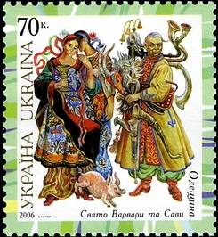 Марка з серії "Народний одяг України" 2006. Свято Варвари